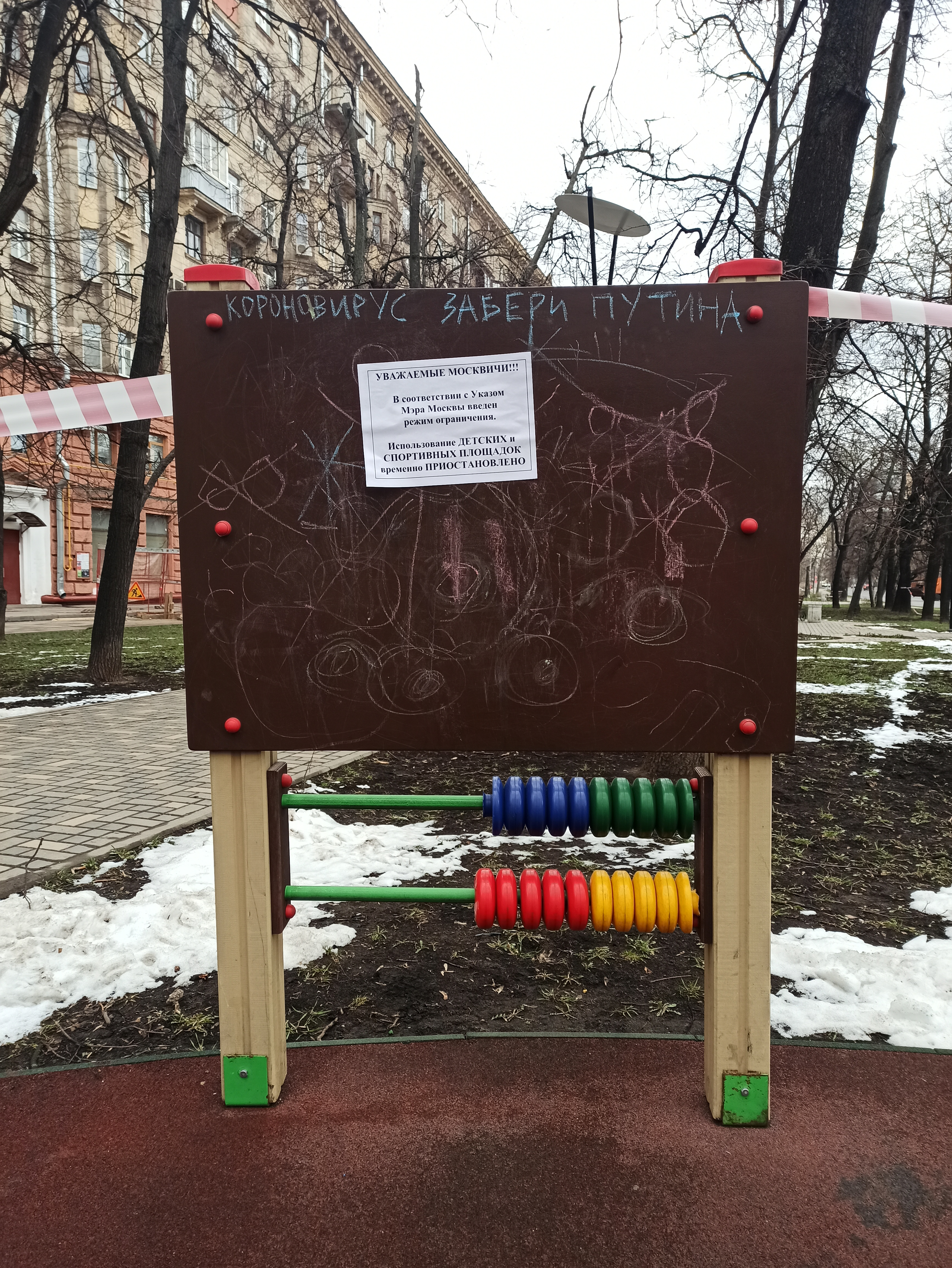 Доска для рисования с объявлением о закрытии детской площадки в Москве